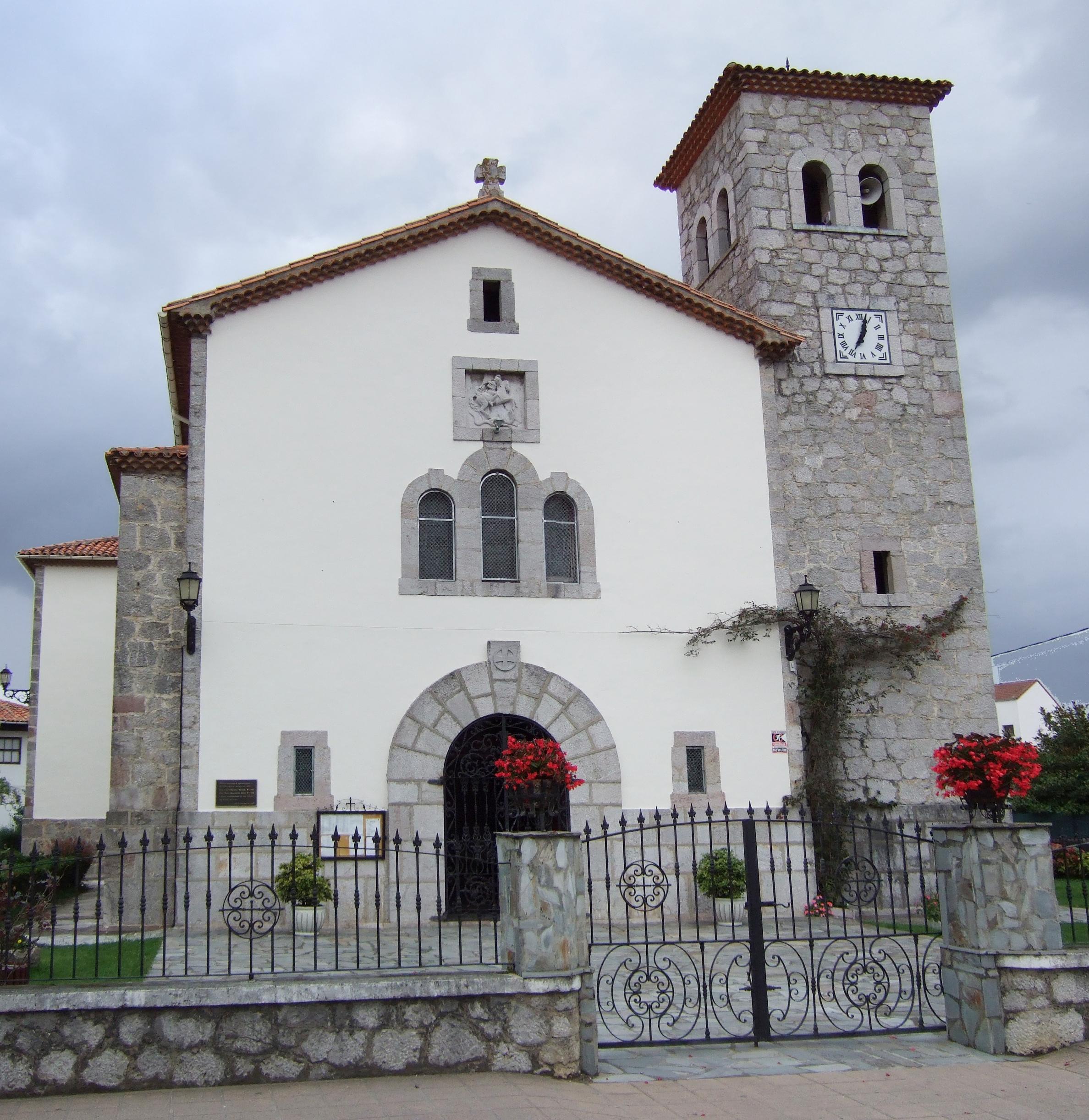 Nueva de Llanes - Iglesia de San Jorge